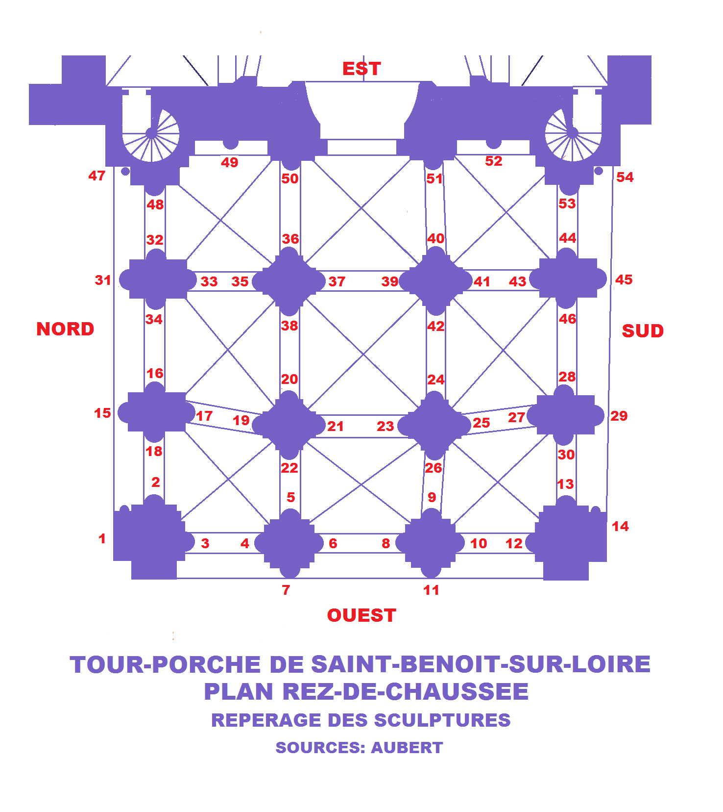 Abbaye de Saint-Benoît-sur-Loire, repérage des sculptures de la tour-porche